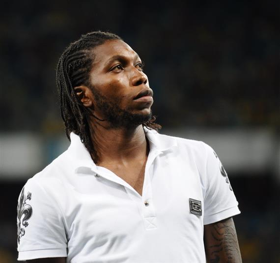 Дьємерсі Мбокані — конголезський футболіст